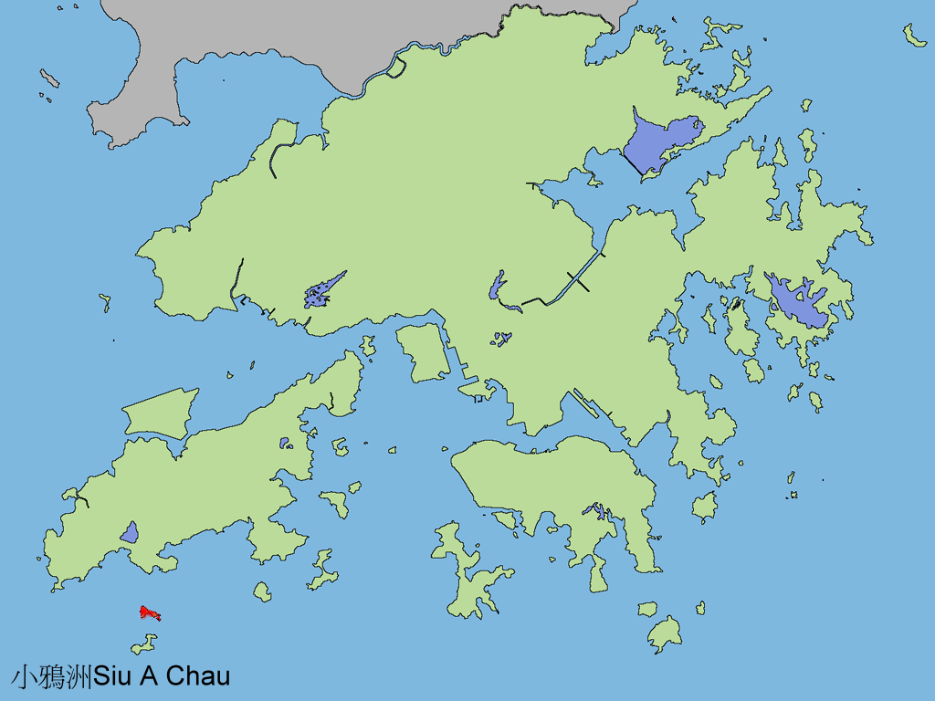 中文（香港）: 小鴉洲，由Iflwlou所創作的香港地圖改造而成。